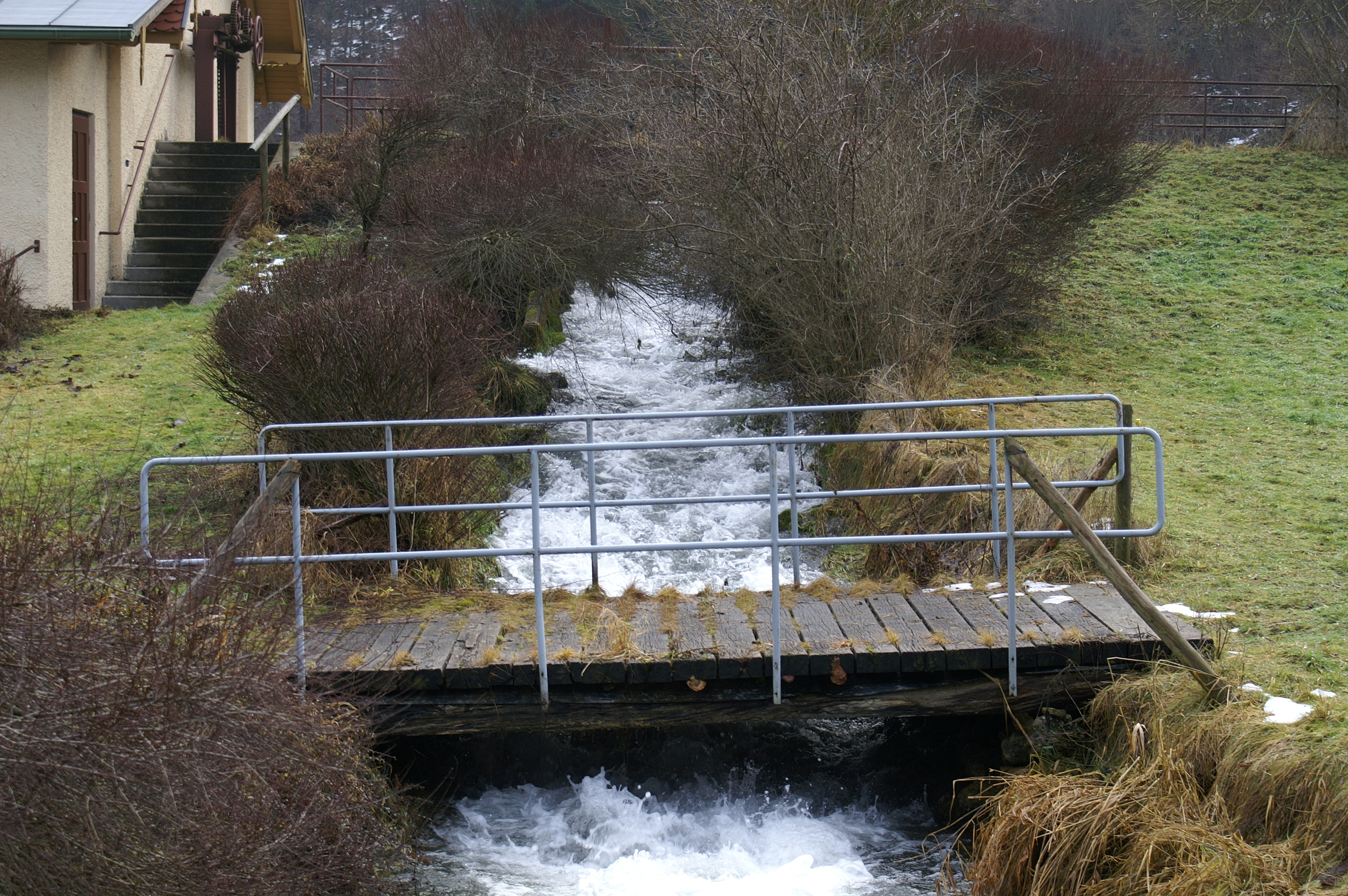 Die Schmiech beim ehemaligen Pumpwerk der Albwasserversorgung VIII/IX in Teuringshofen.